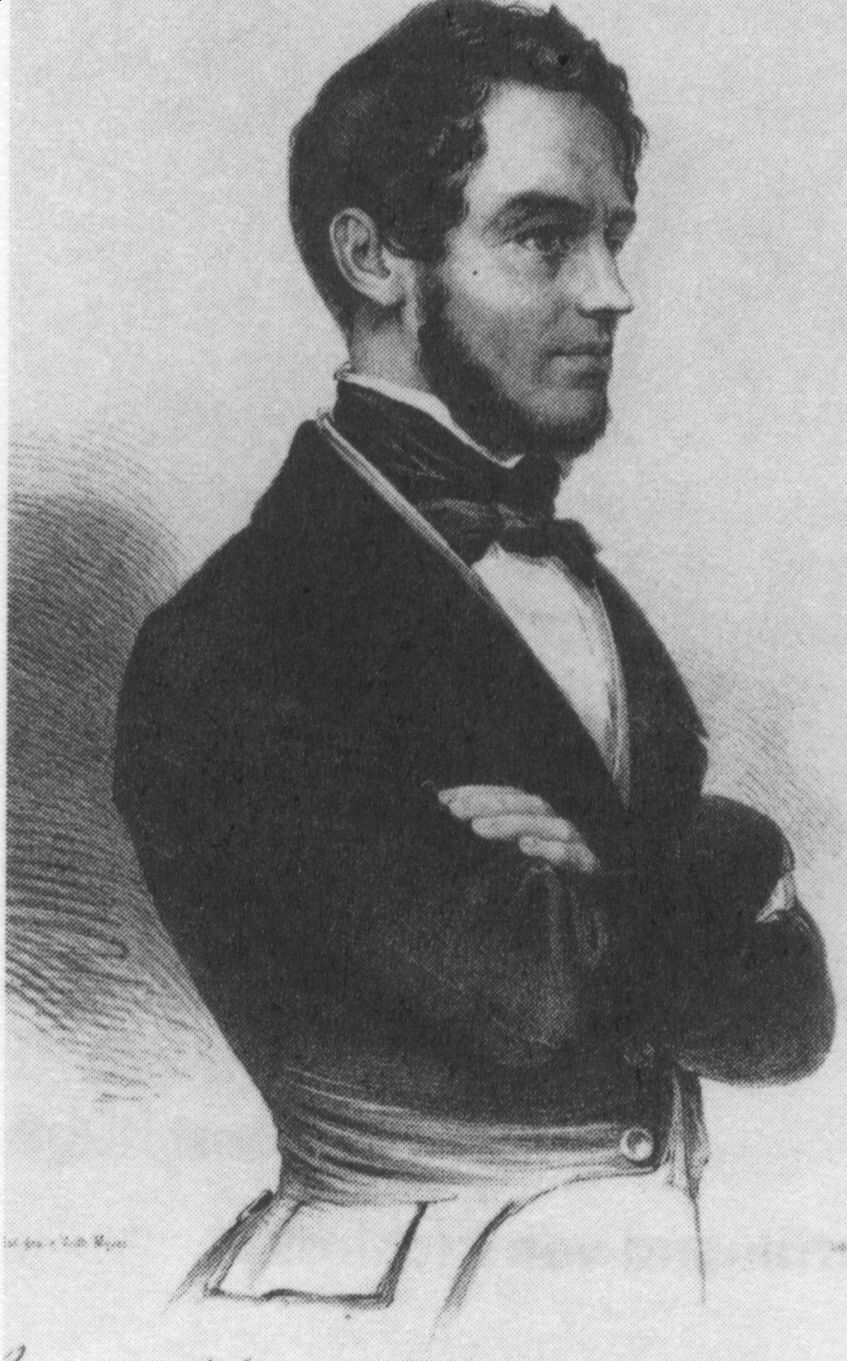 Alexander Karl Hermann Braun (1807–1868), deutscher Politiker, sächsischer Landesminister